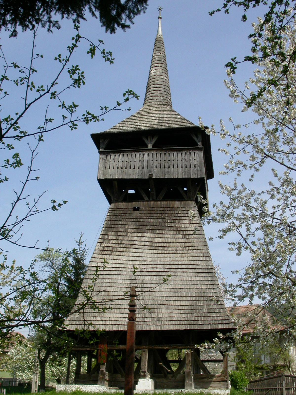 Clopotnița de lemn a bisericii unitariene, 1699